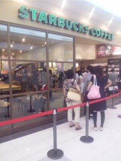 スターバックスコーヒー青森ELM店